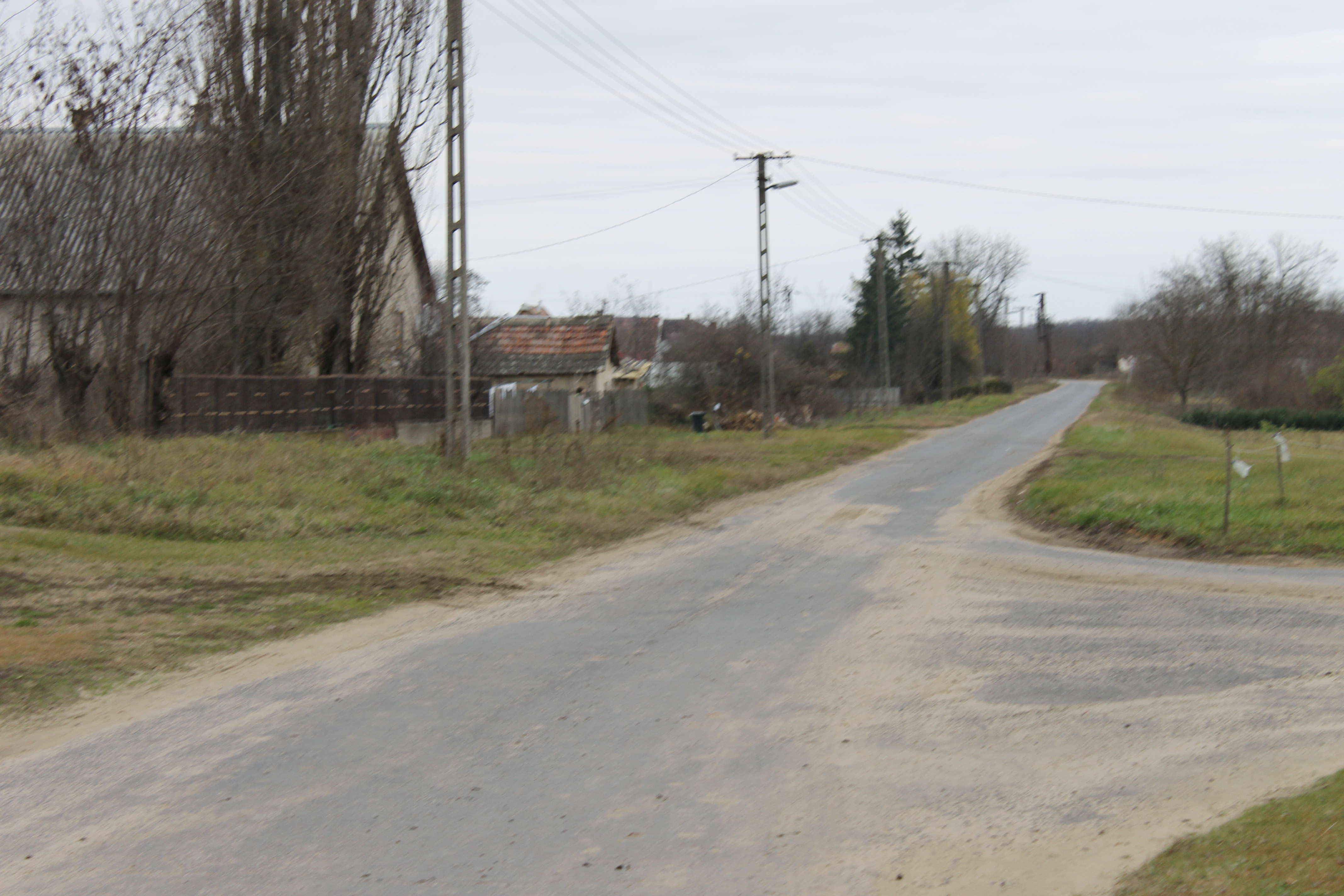 A nagymogyorósi buszforduló